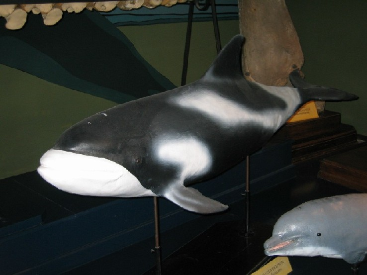 Modell eines Weißschnauzendelfins im Naturhistorischen Museum Wien